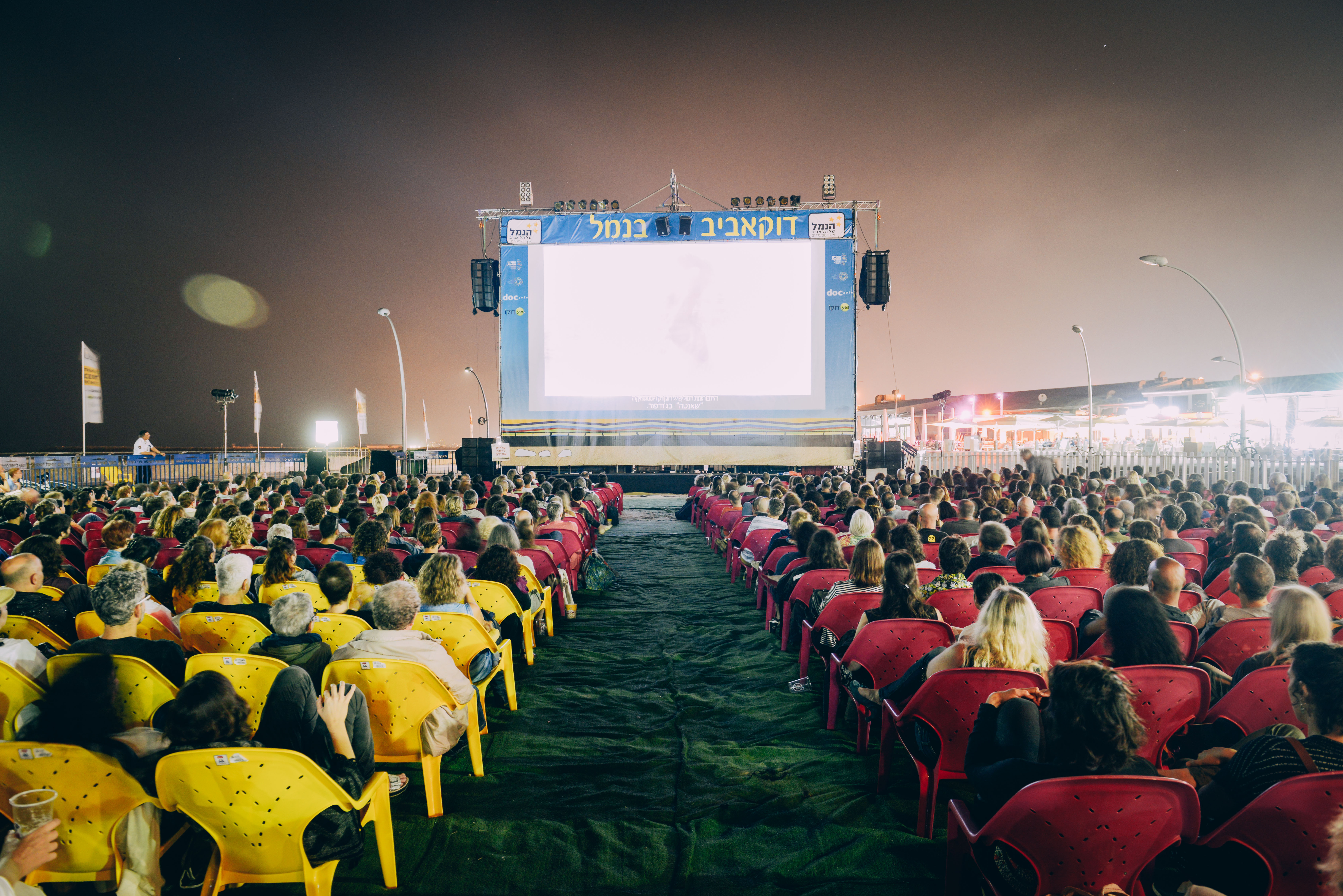 הקרנת חוצות בדוקאביב